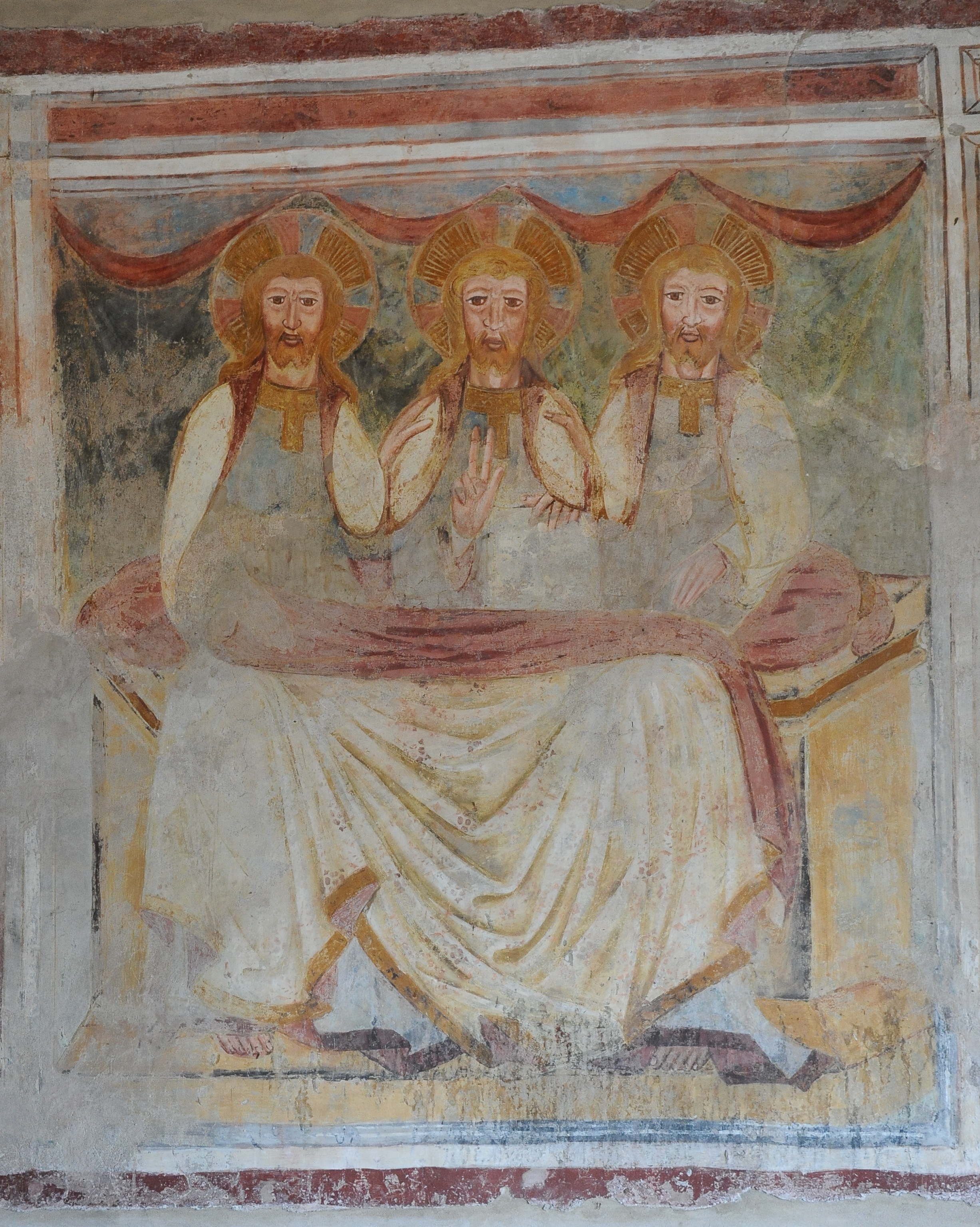 Chiesa di San Leonardo a Lisignago. Trinità orizzontale e antropomorfa.